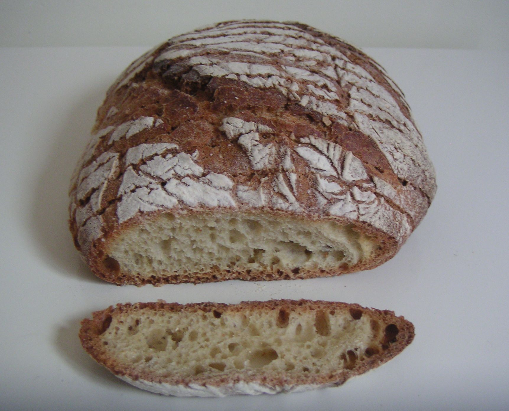 Torta, tourte, pain de campaigne o pa de pagès occità. Foto presa a la Corresa.